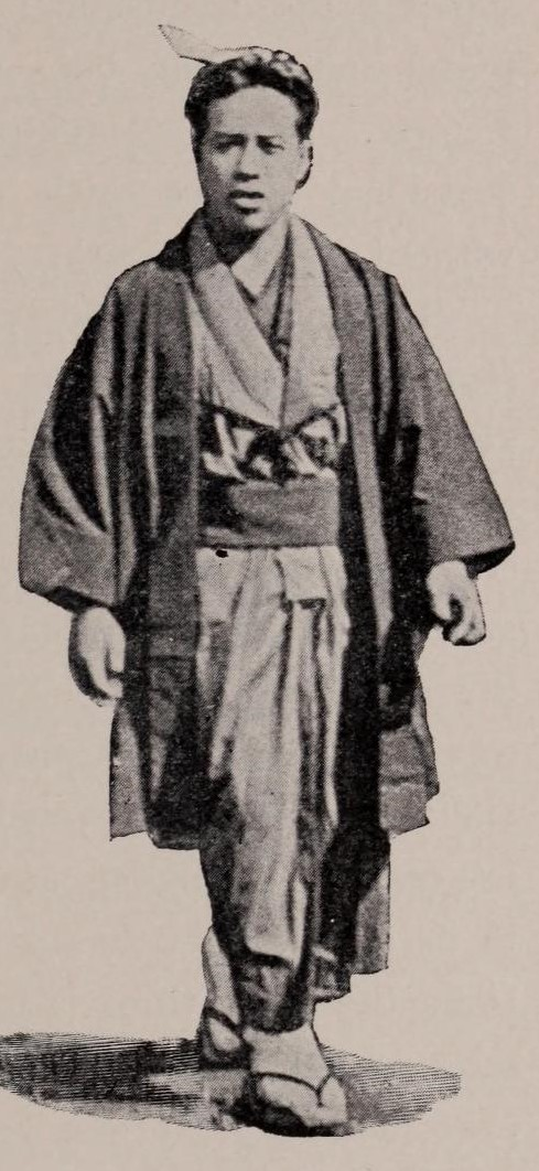 壮士のいでたちの典型例